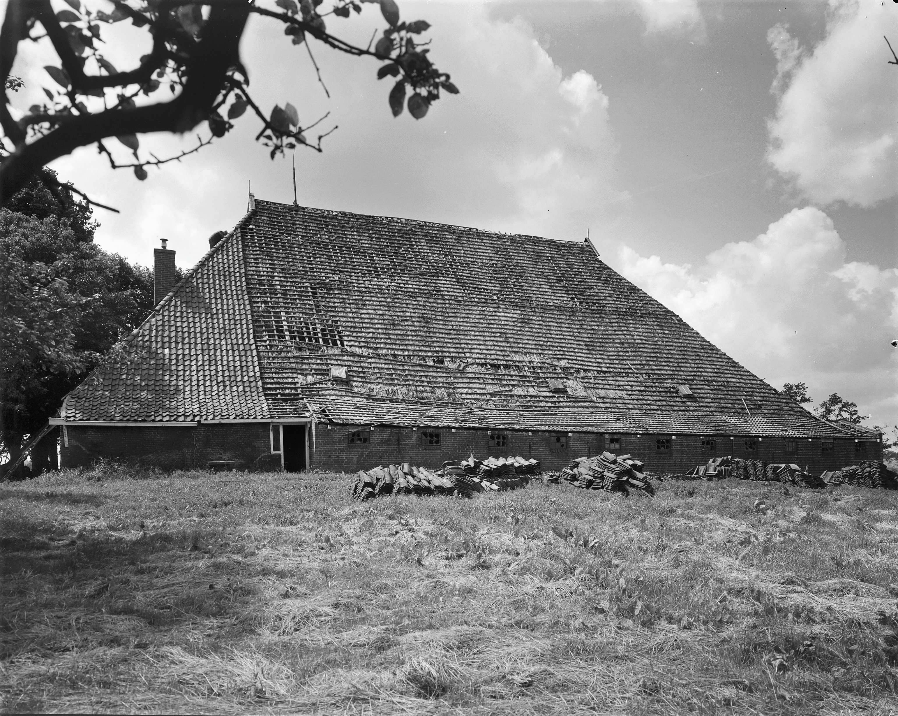 Sikkema-State: exterieur oostgevel